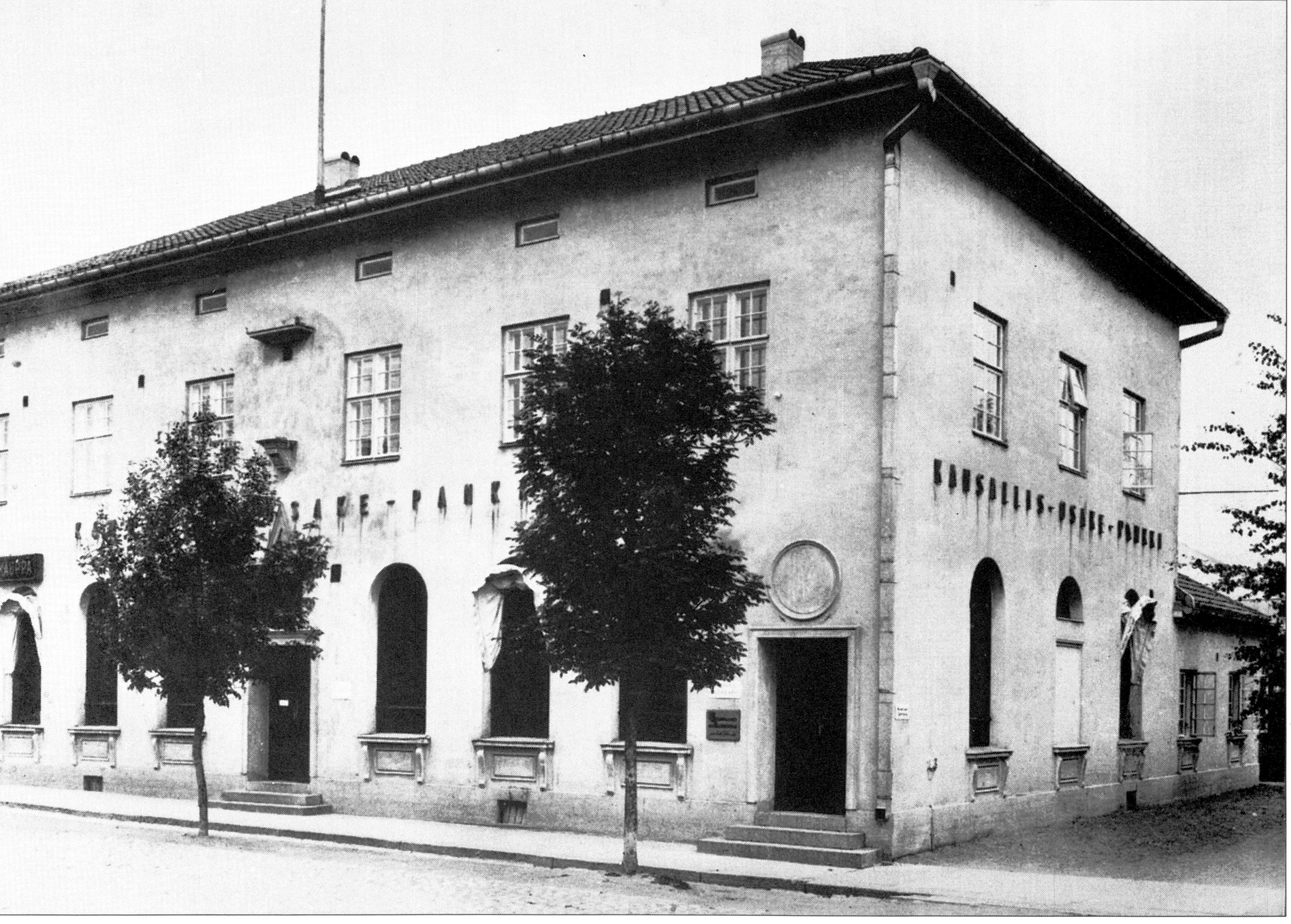 Kansallis-osake pankki 1930-luvulla